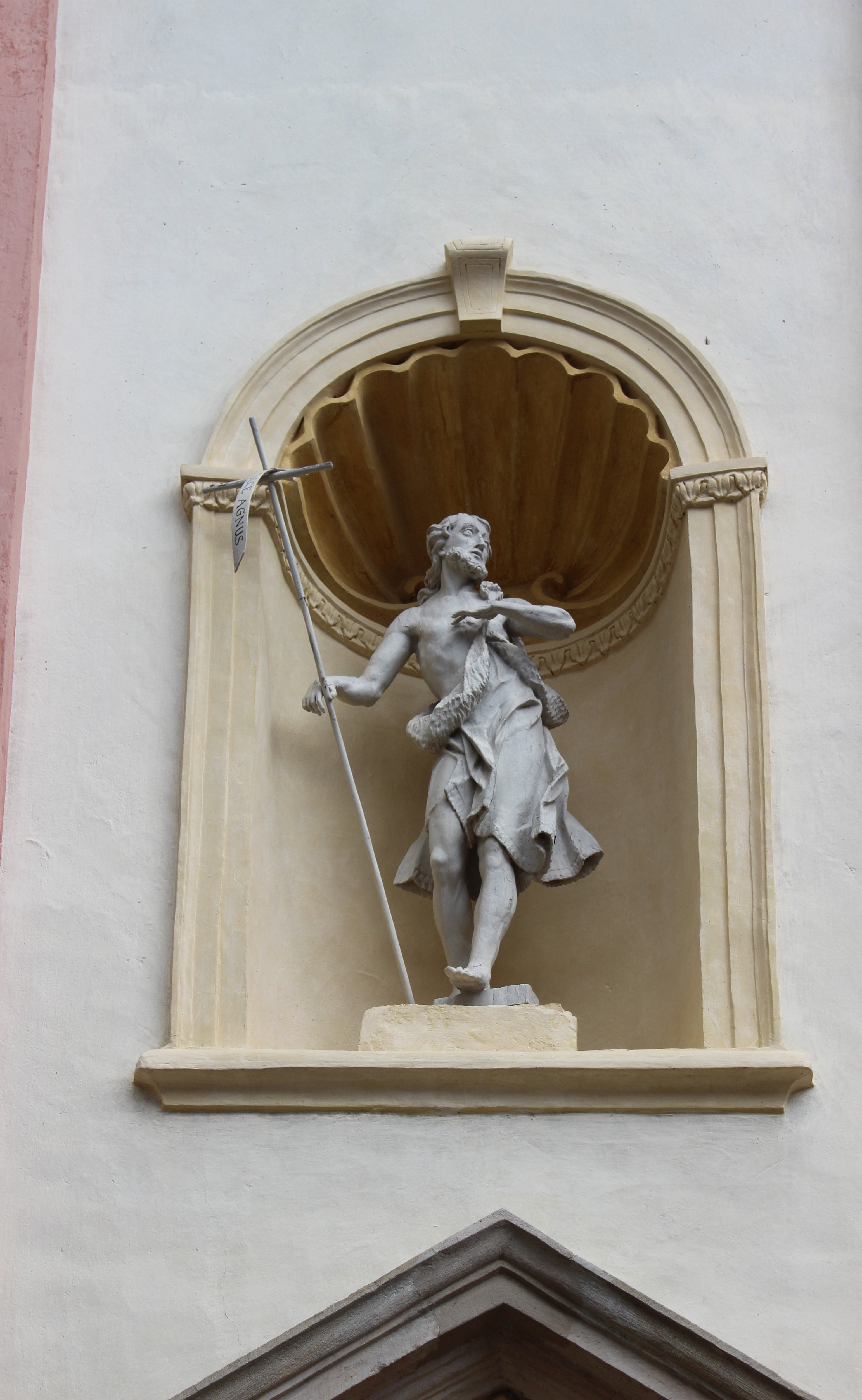 Rundbogennische an der Pfarrkirche zur Schmerzhaften Muttergottes in Riffian